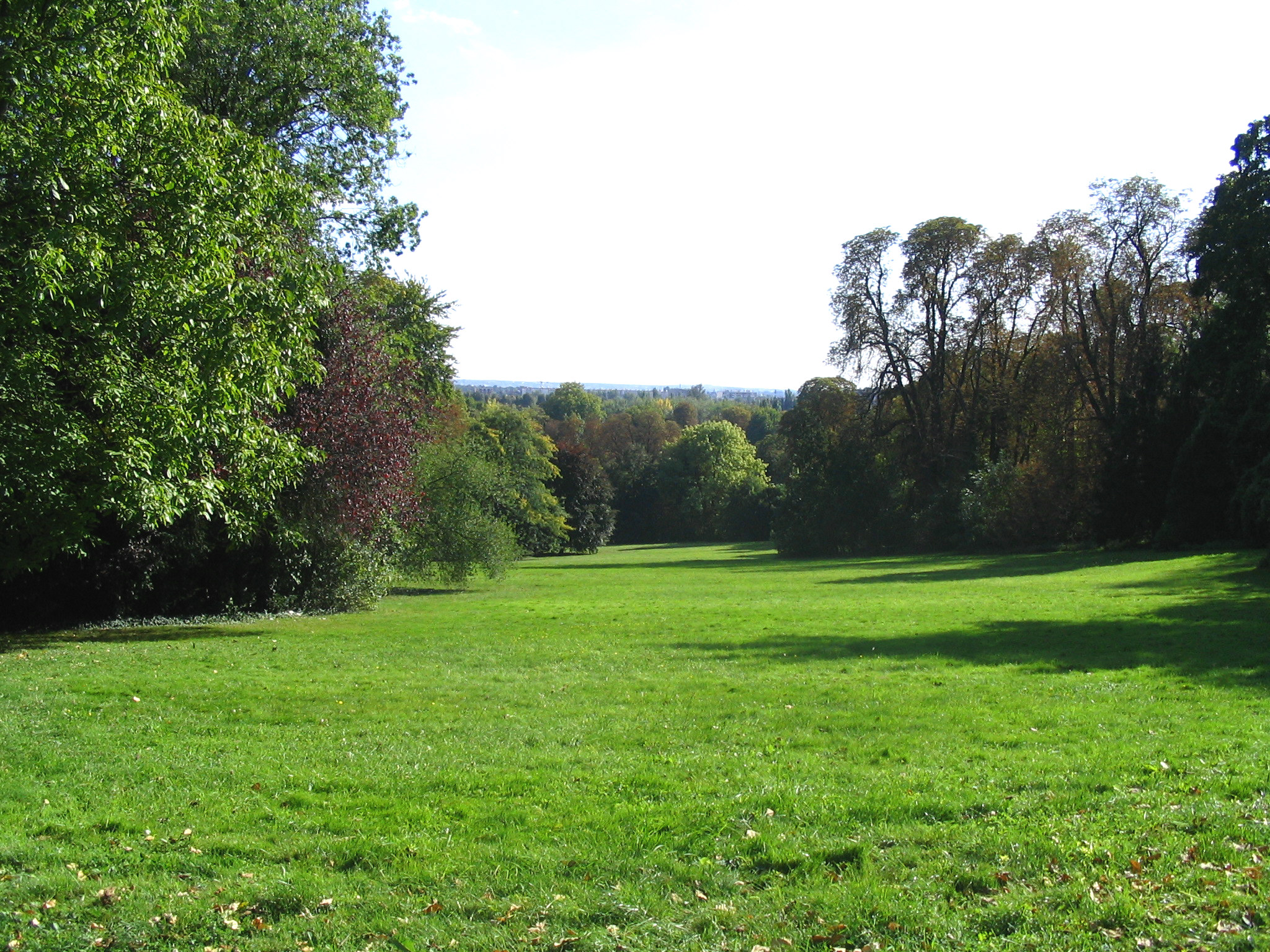 Château Smith-Champion, parc à l'anglaise - Nogent-sur-Marne - France